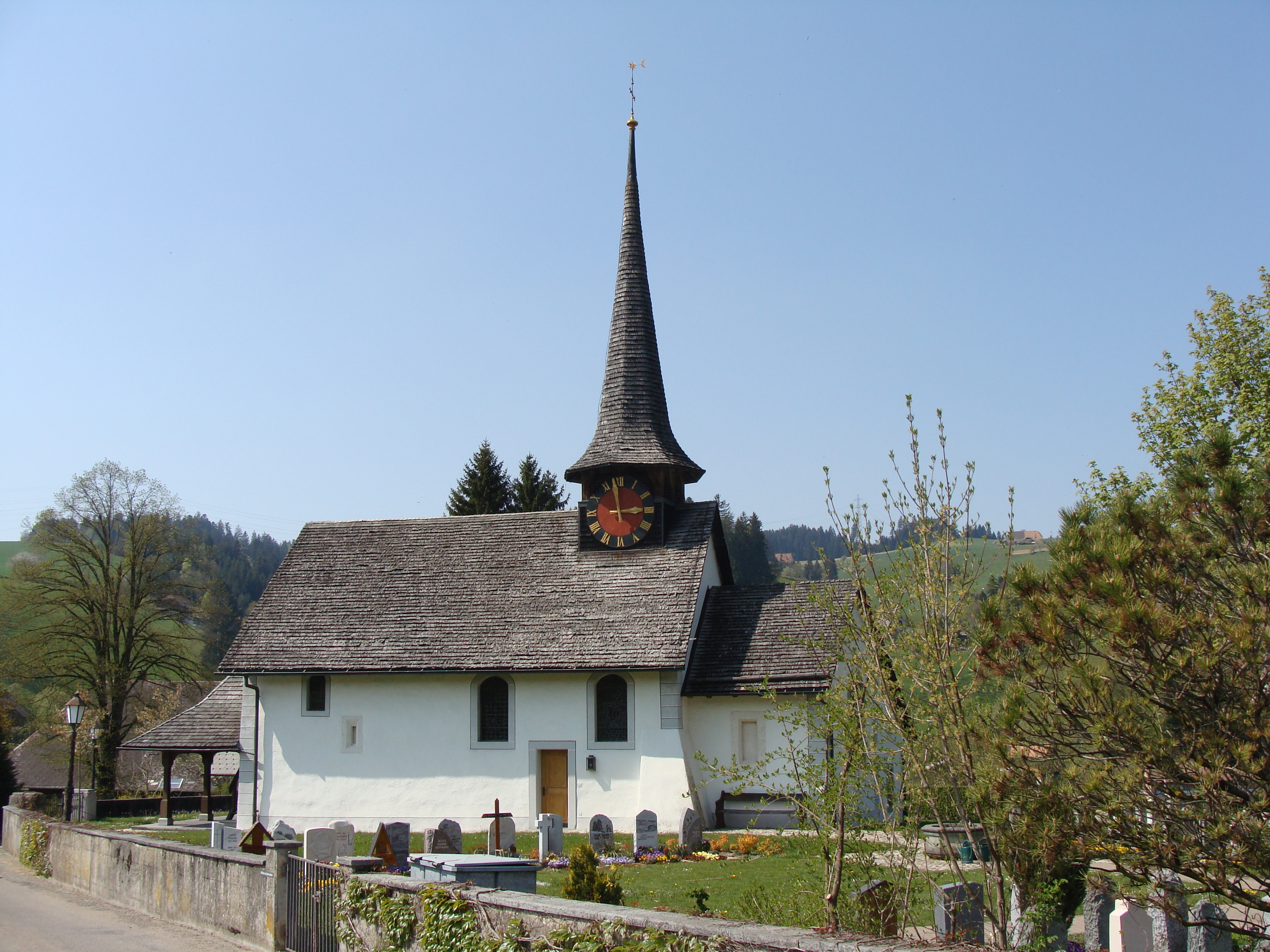 Kirche von Rügsbach